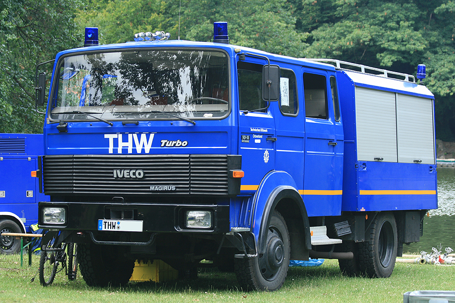 Magirus-Deutz MK-Reihe als Iveco 90-16 Turbo, im Nutzung beim THW